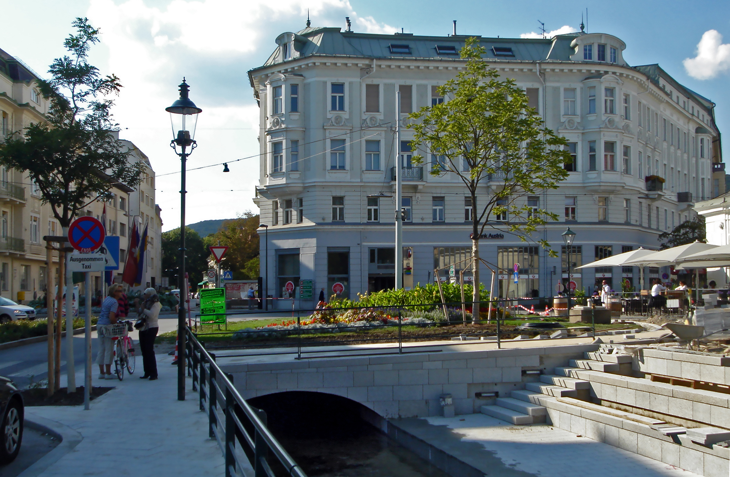 Baden bei Wien, Josefsplatz, Wiederöffnung des Badener Mühlbachs ab Juni 2013, Westportal